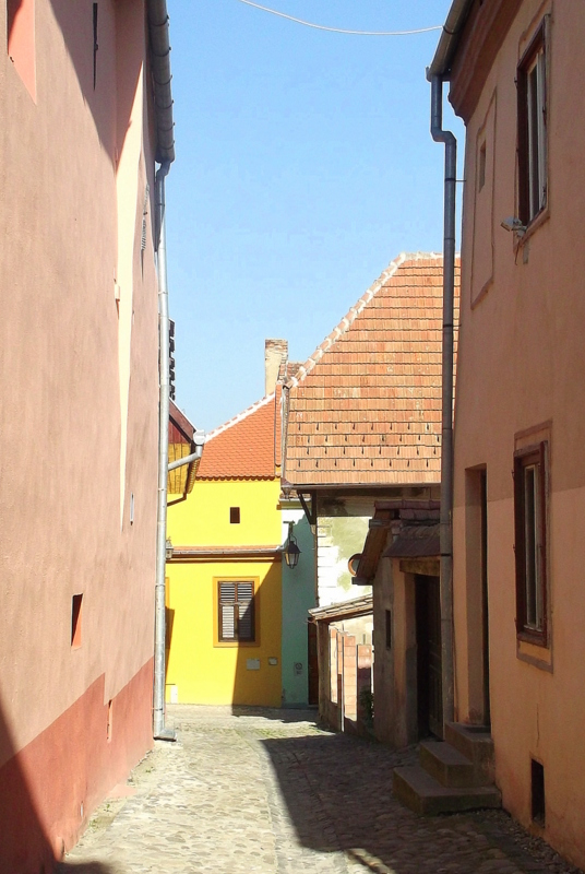 Rumunia, Sighişoara